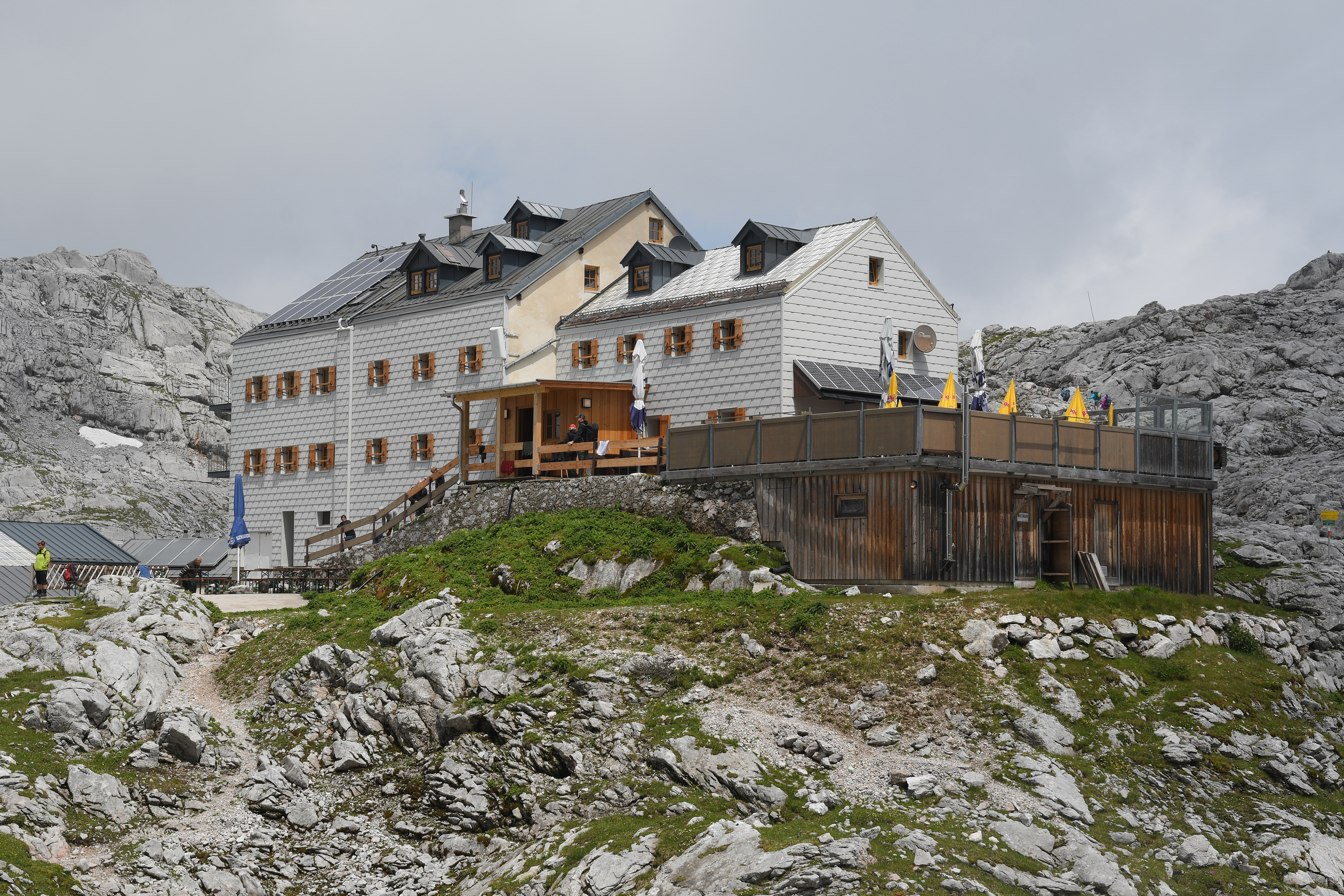 Riemannhaus Eigentümer: Deutscher Alpenverein (DAV) / Sektion Ingolstadt Ort: Steinernes Meer/Berchtesgadener Alpen Aufnahmedatum: 30. Juni 2018